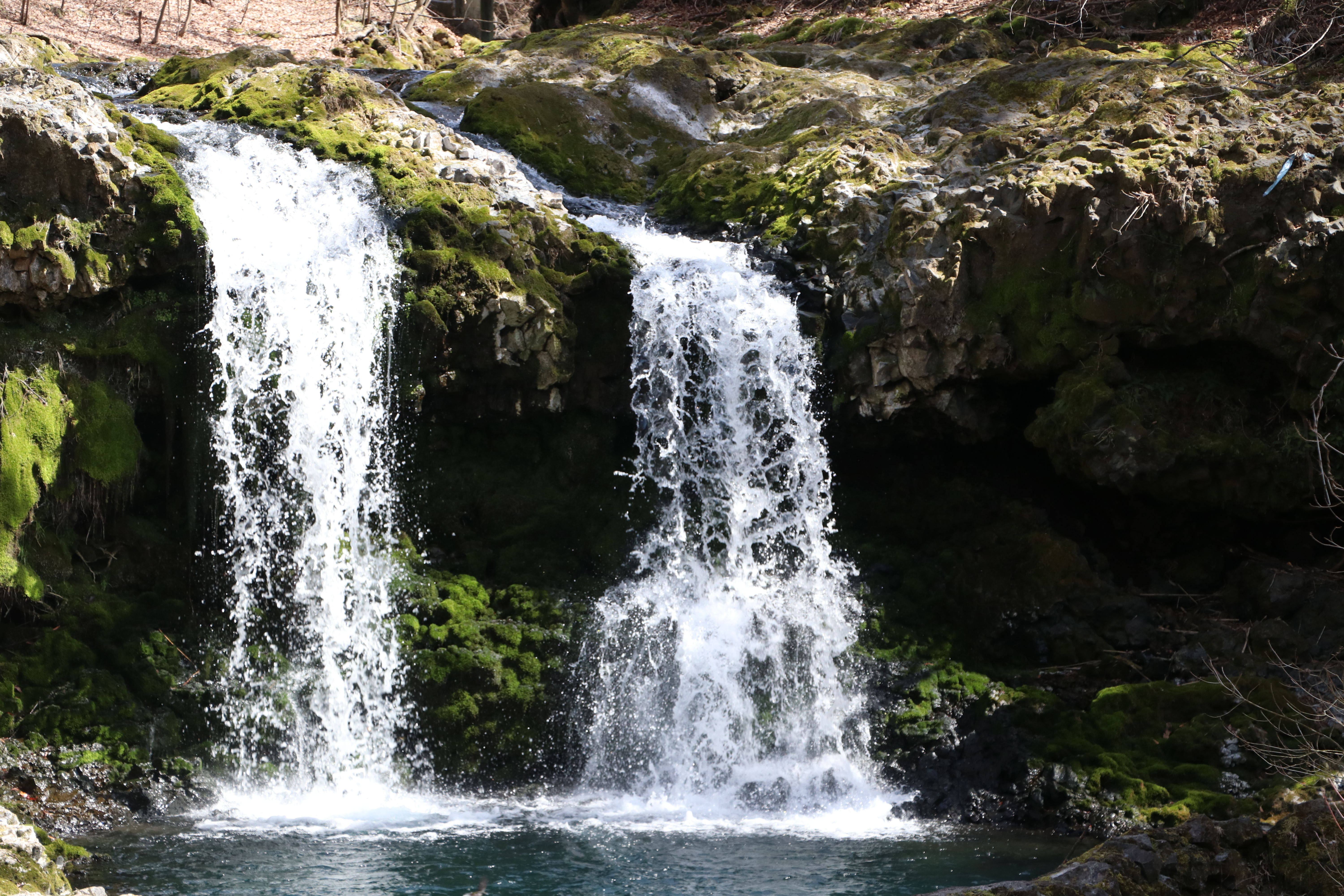 山梨県忍野村に存在する鐘山の滝。 動画: File:Kaneyamanotaki Waterfall Movie.webm